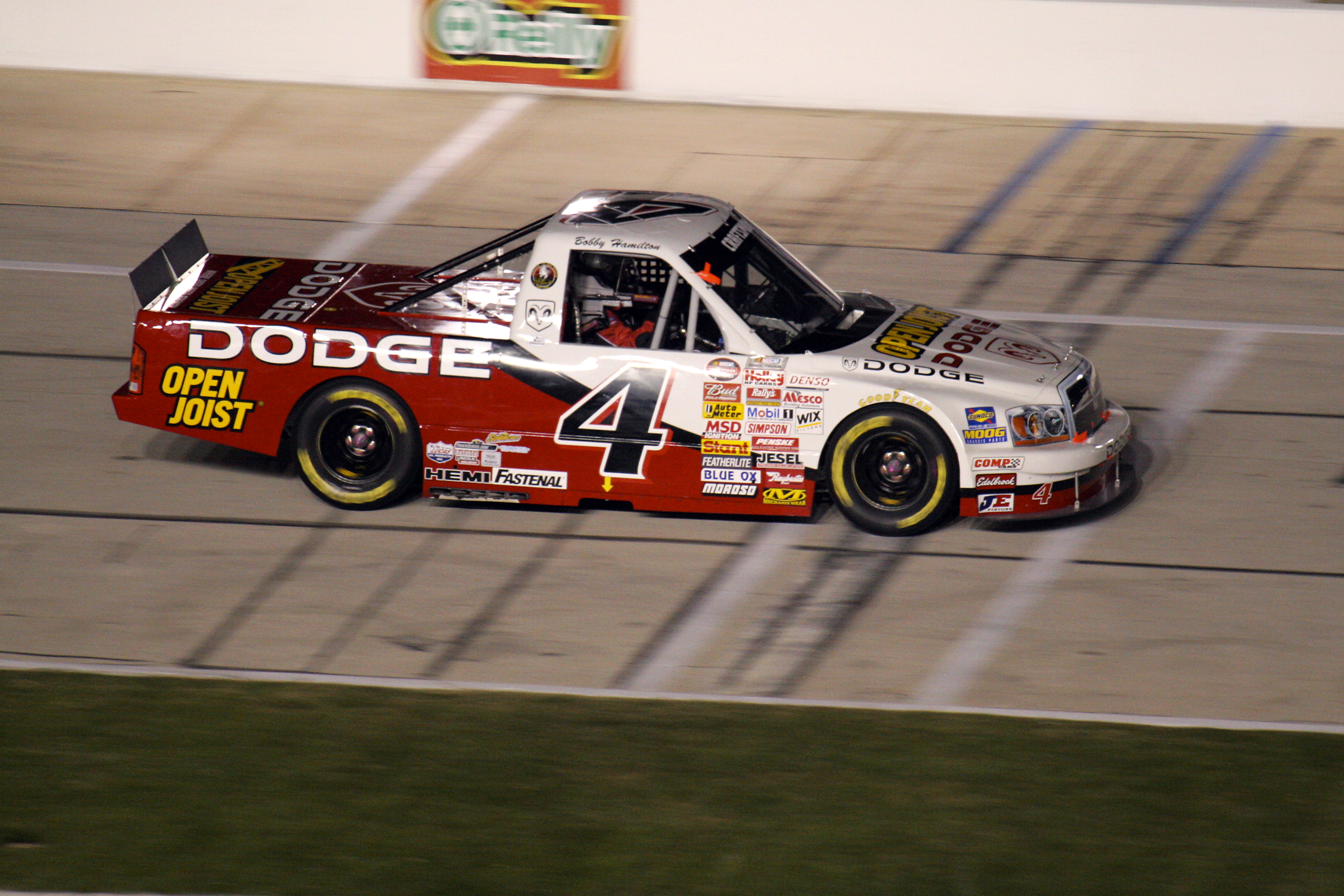 NASCAR Craftsman Truck Series driver Mike Bliss